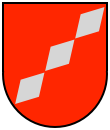 Familienwappen derer von Lützenrath/Lutzerode, 15.–17. Jht.